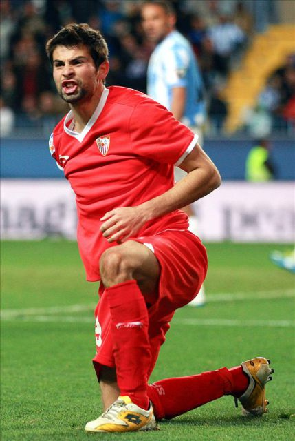 Lateral derecho del Sevilla Fútbol Club.